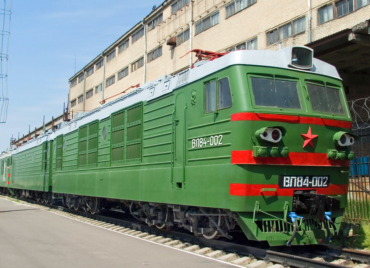 Электровоз ВЛ84-002 в Ростовском музее железнодорожного транспорта СКЖД